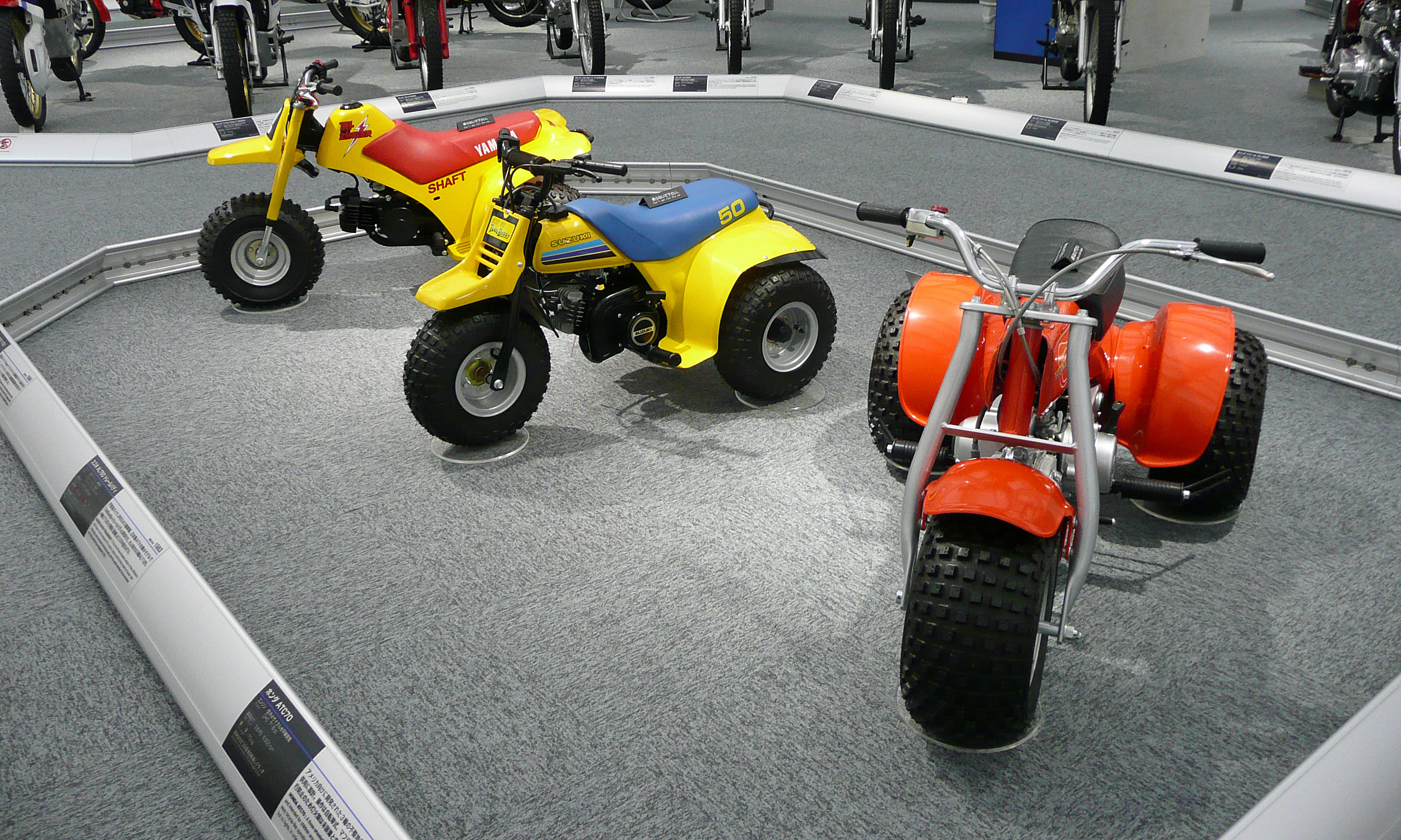 右からホンダ ATC70（1973年）、スズキ ALT50 トレールバディ（1983年）、ヤマハ TRI-ZINGER YT60（1984年） 子供向けATV ホンダコレクションホールにて撮影